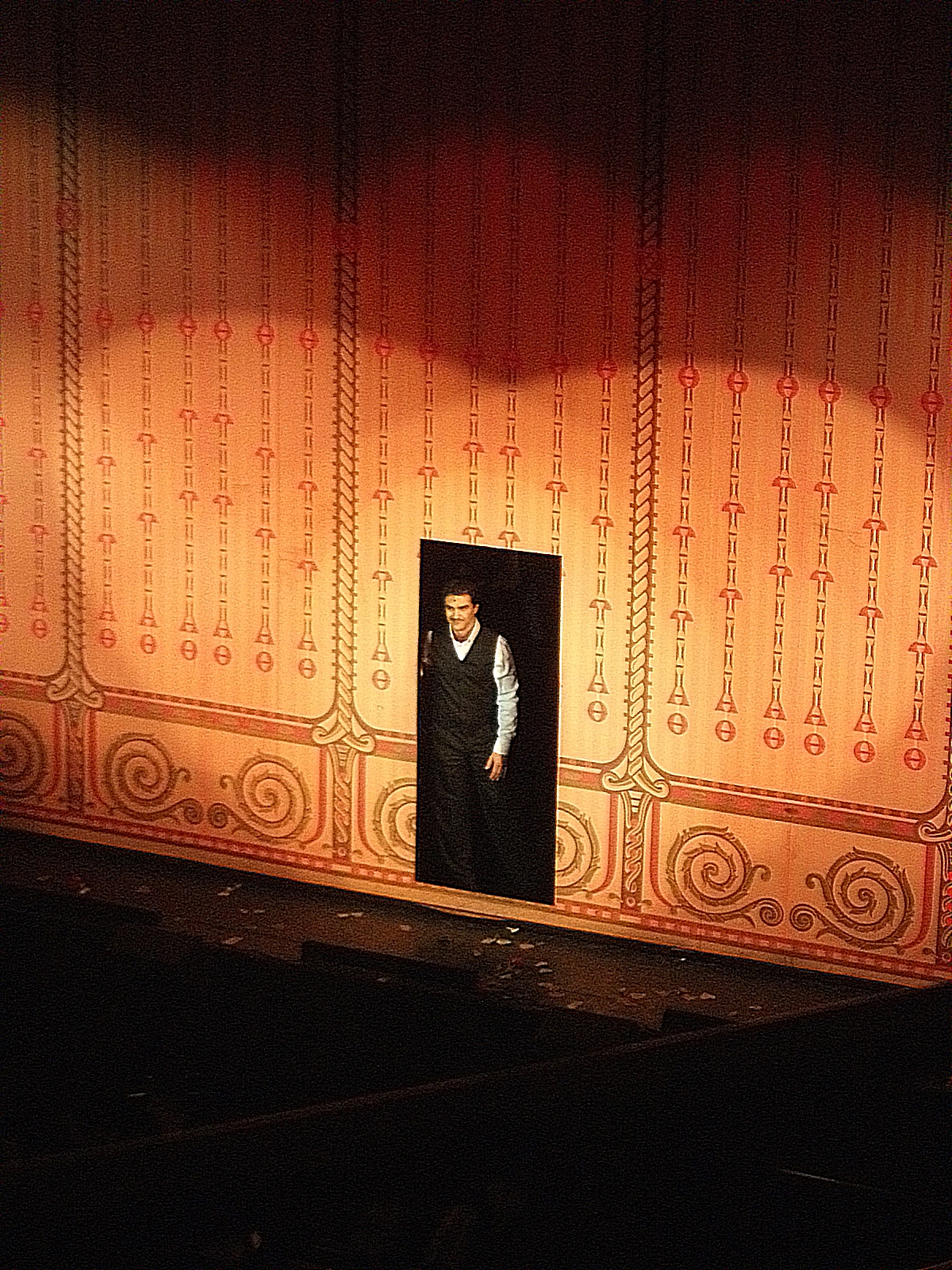 Dolhai Attila a Budapesti Operettszínházban játsszotta Józsi, cigányprímás szerepét a Cigányszerelemben.